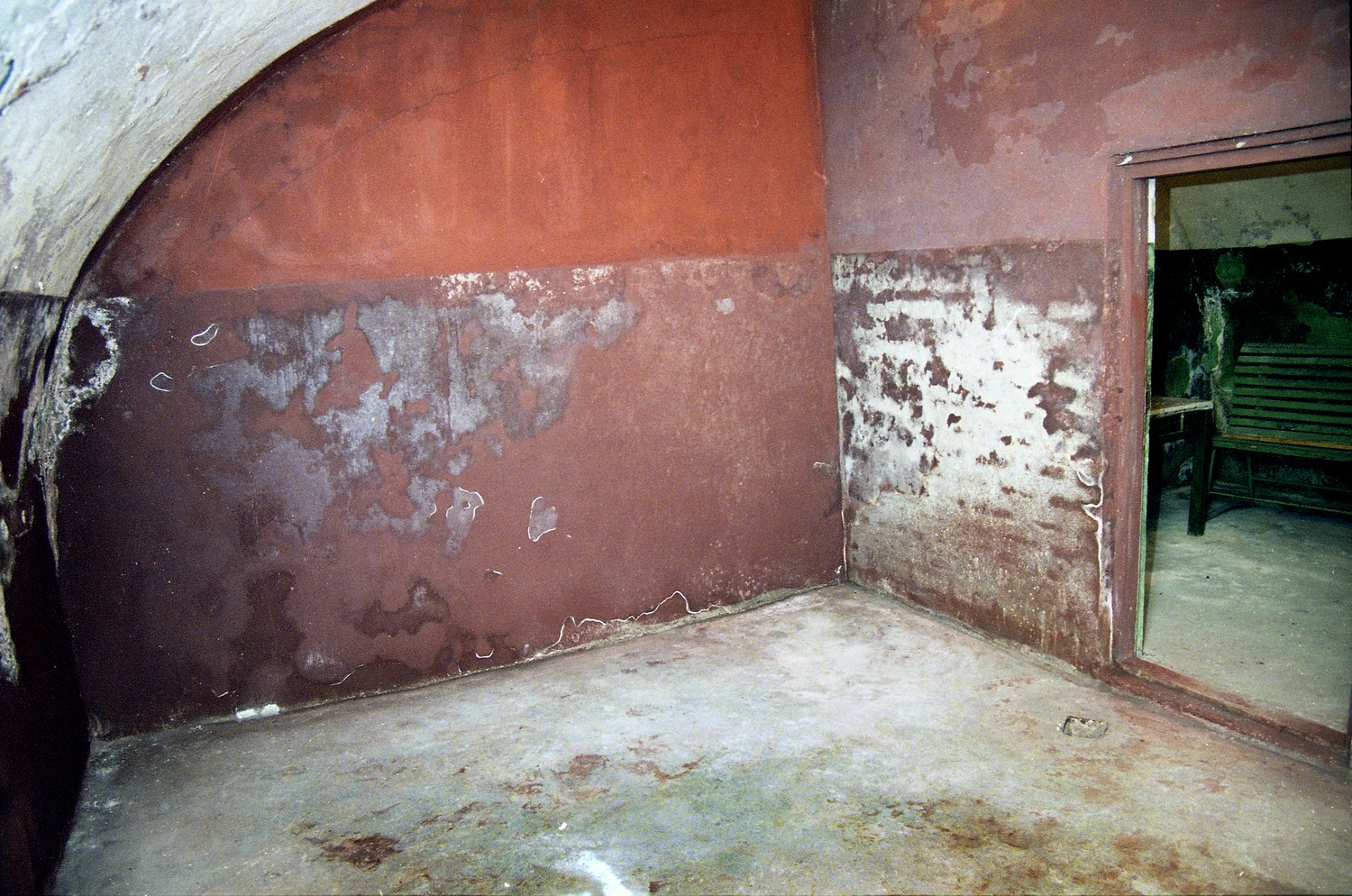 Patarei vangla 2002 (19) hukkamiskamber